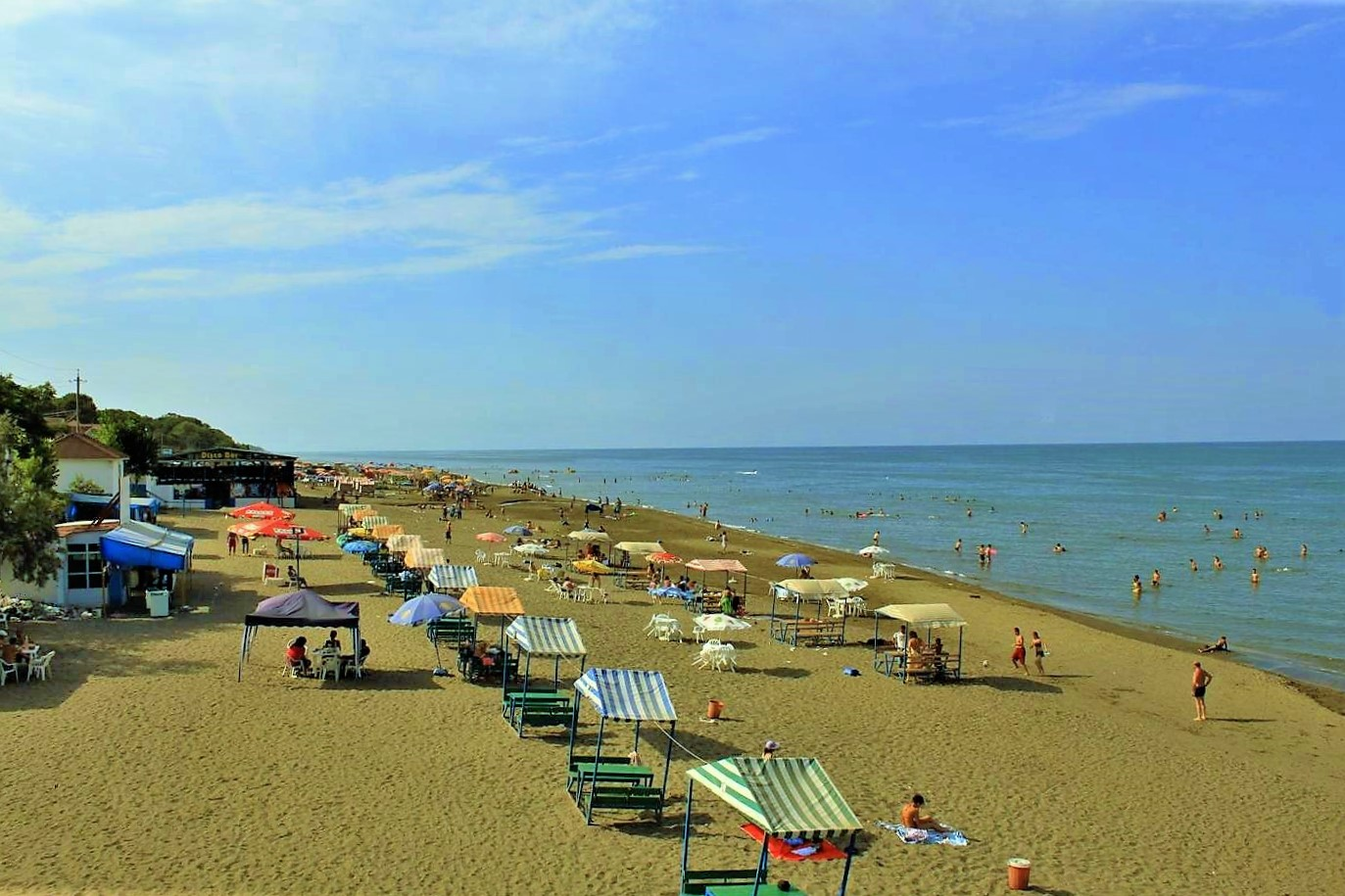 Зона отдыха Набрань, Хачмазский район Азербайджана.